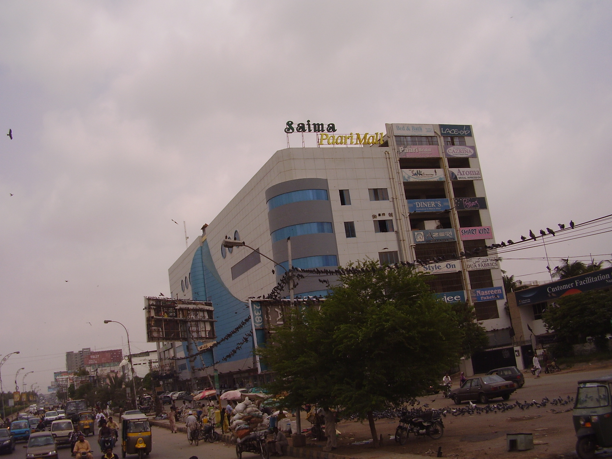 Saima Paari Mall